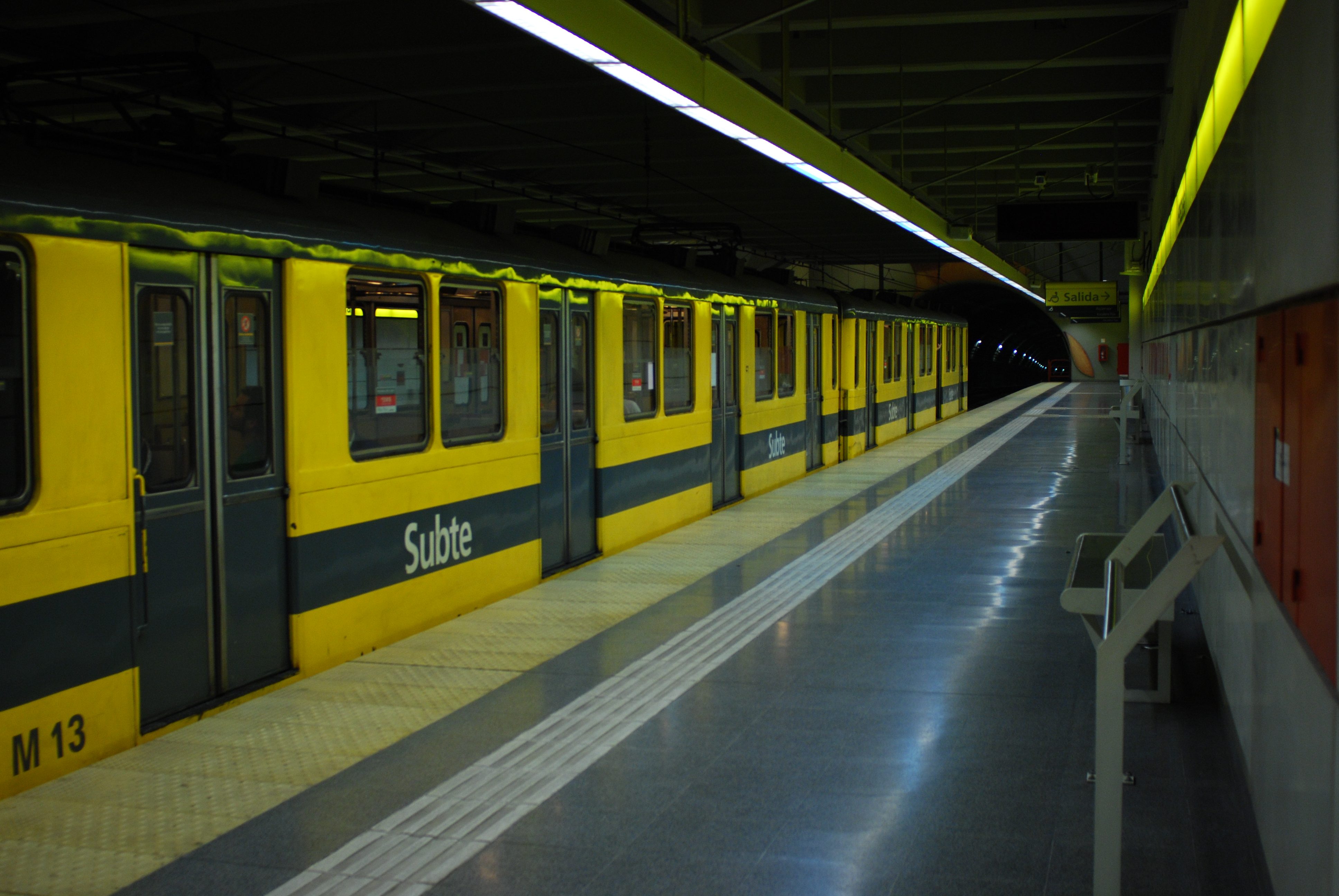 Línea H de subtes en Buenos Aires, Anden en la estación Venezuela (Argentina, noviembre 2008).jpg